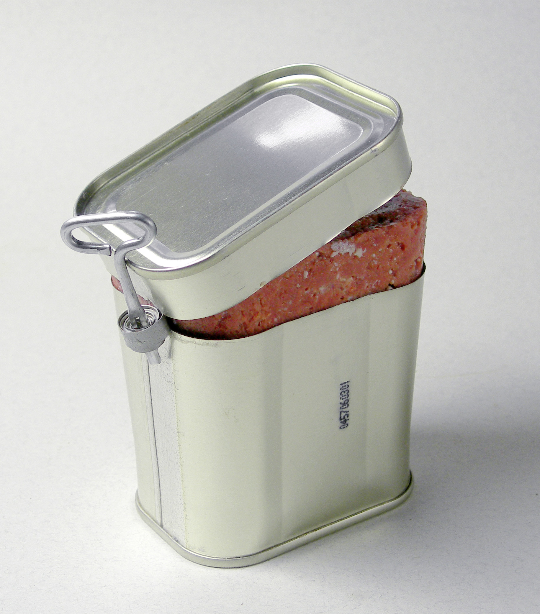 Dose mit Corned Beef. Eigene Aufnahme